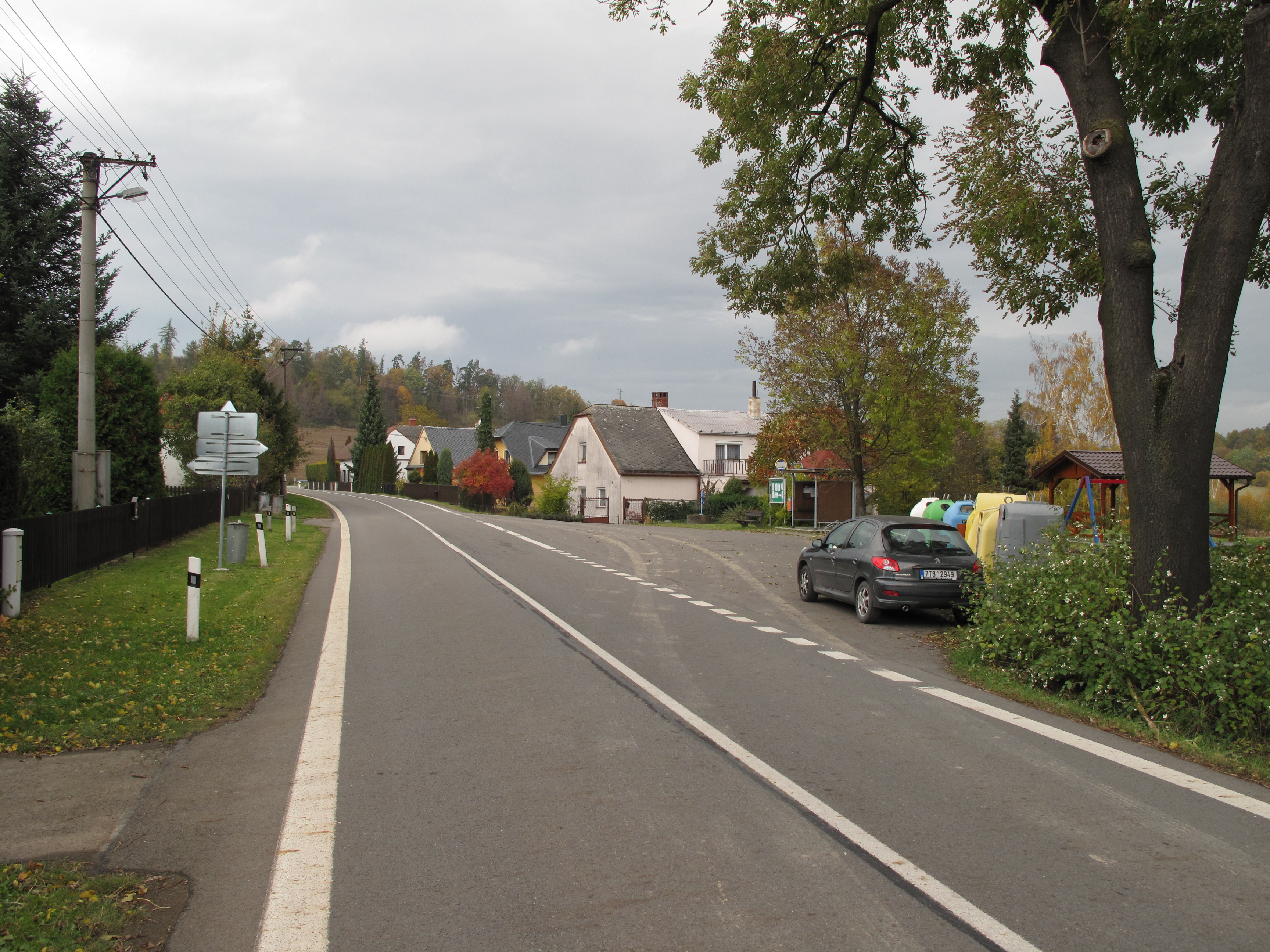 Láryšov. Okres Bruntál, Česká republika.